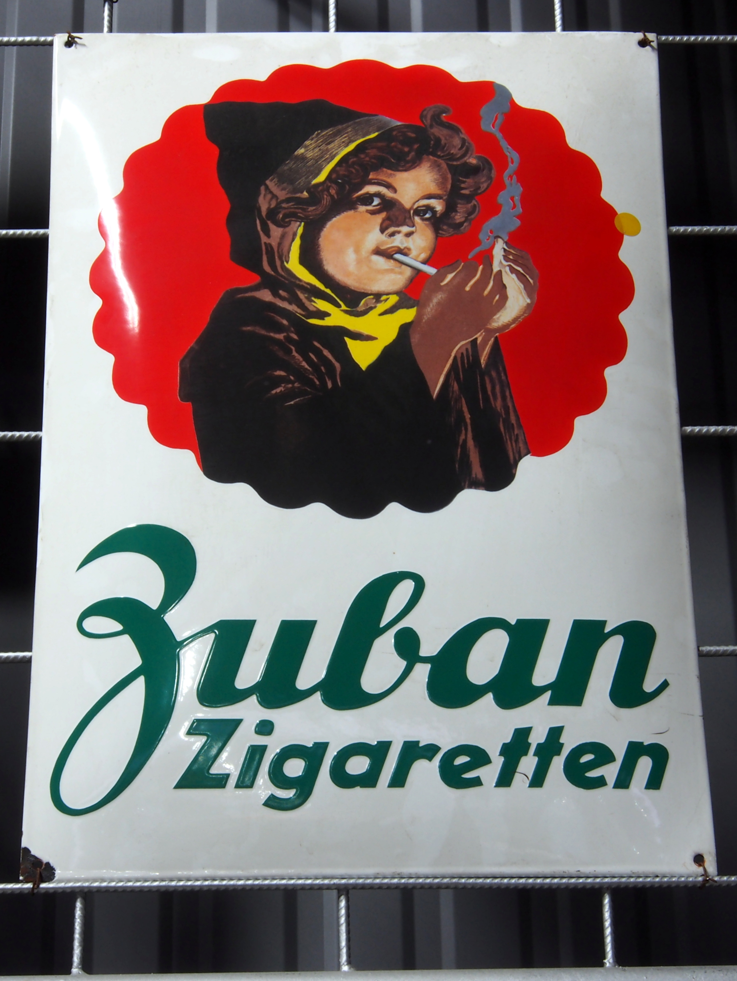 Zuban zigaretten.